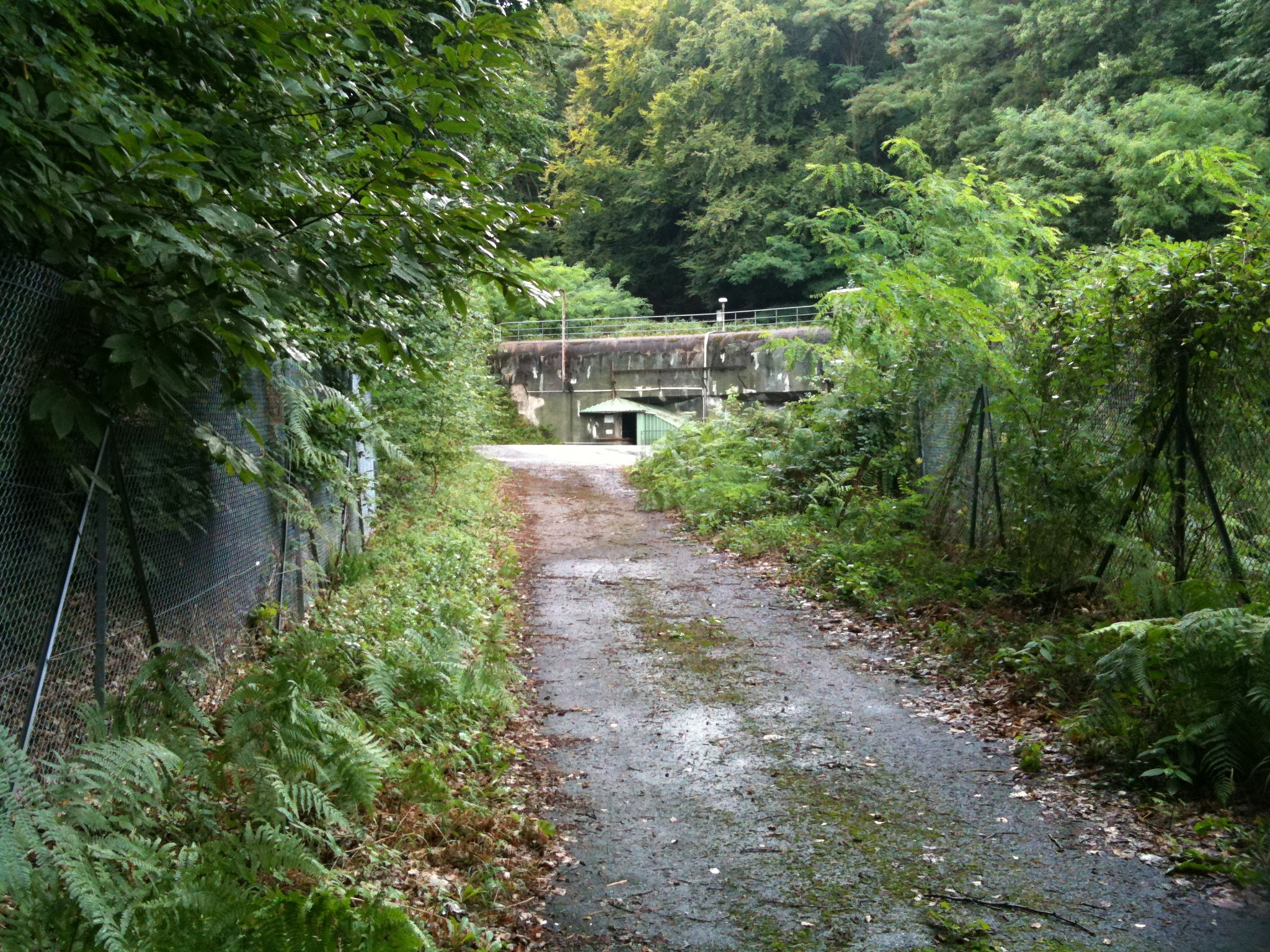 Vue du bloc 9 de l'Ouvrage du Hochwald